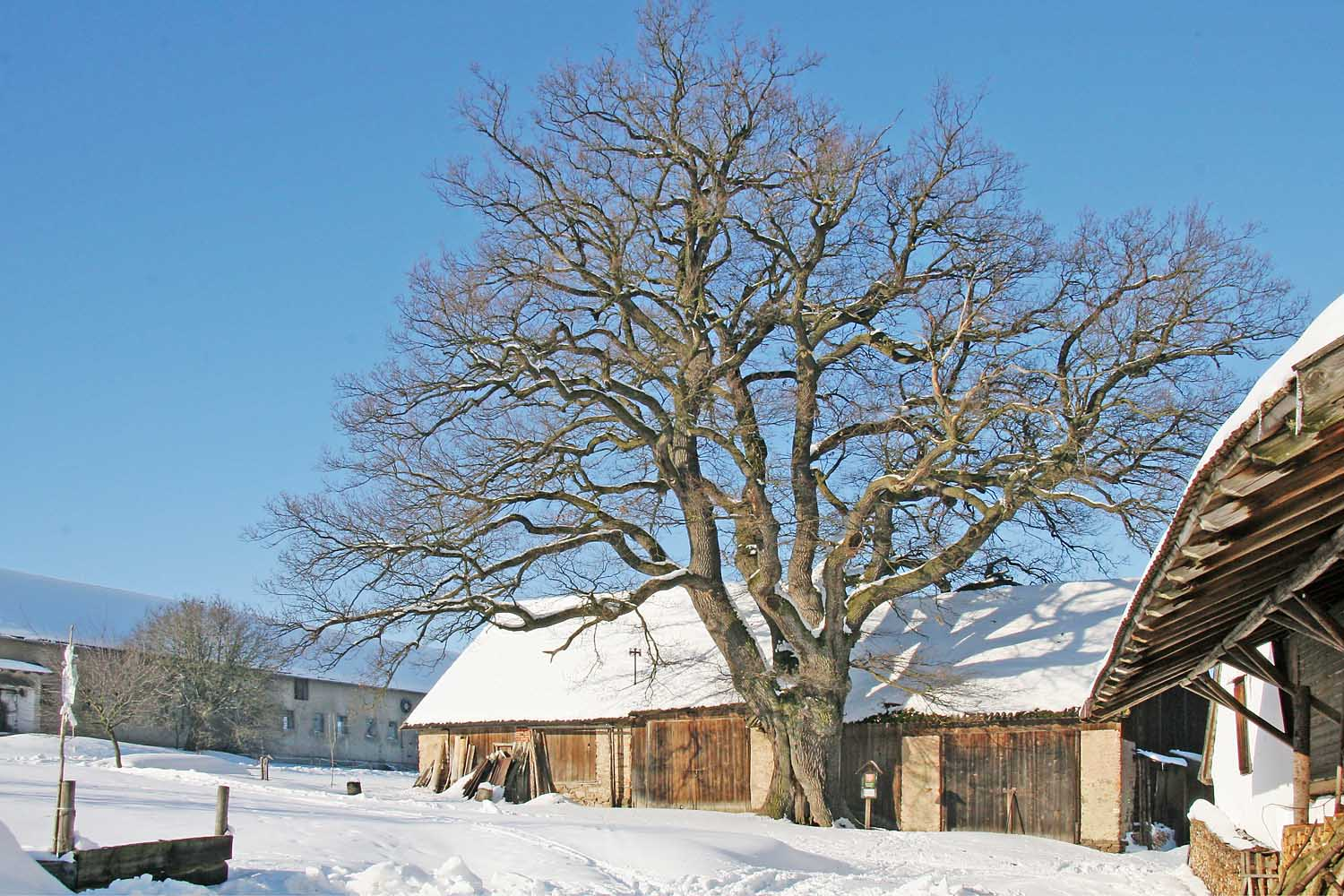 Památný Pajkrův dub v obci Telecí autor:Zp